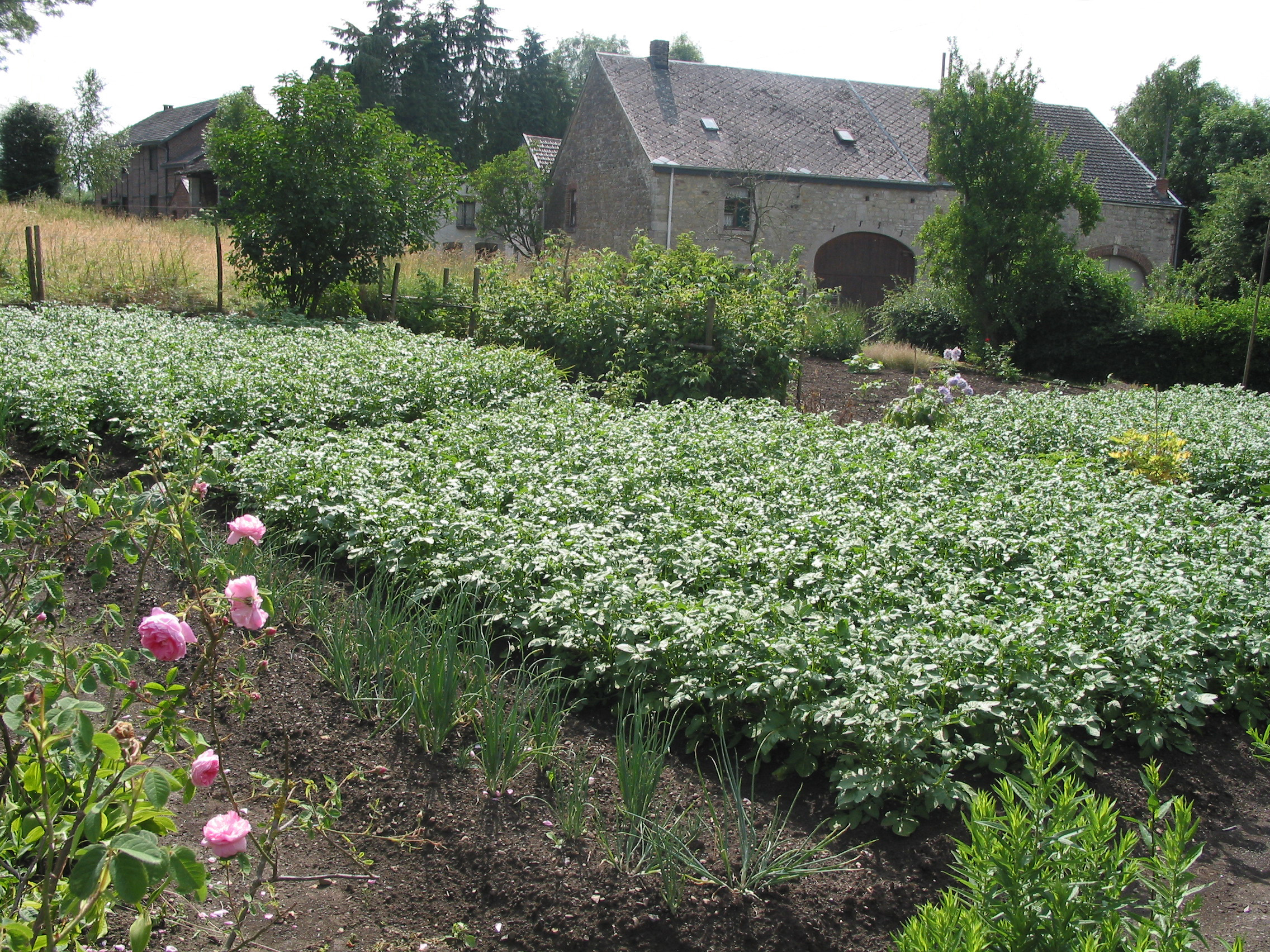 Wéris (Belgique/Belgium), le potager de la vieille ferme./ the kitchen garden of the old farm.